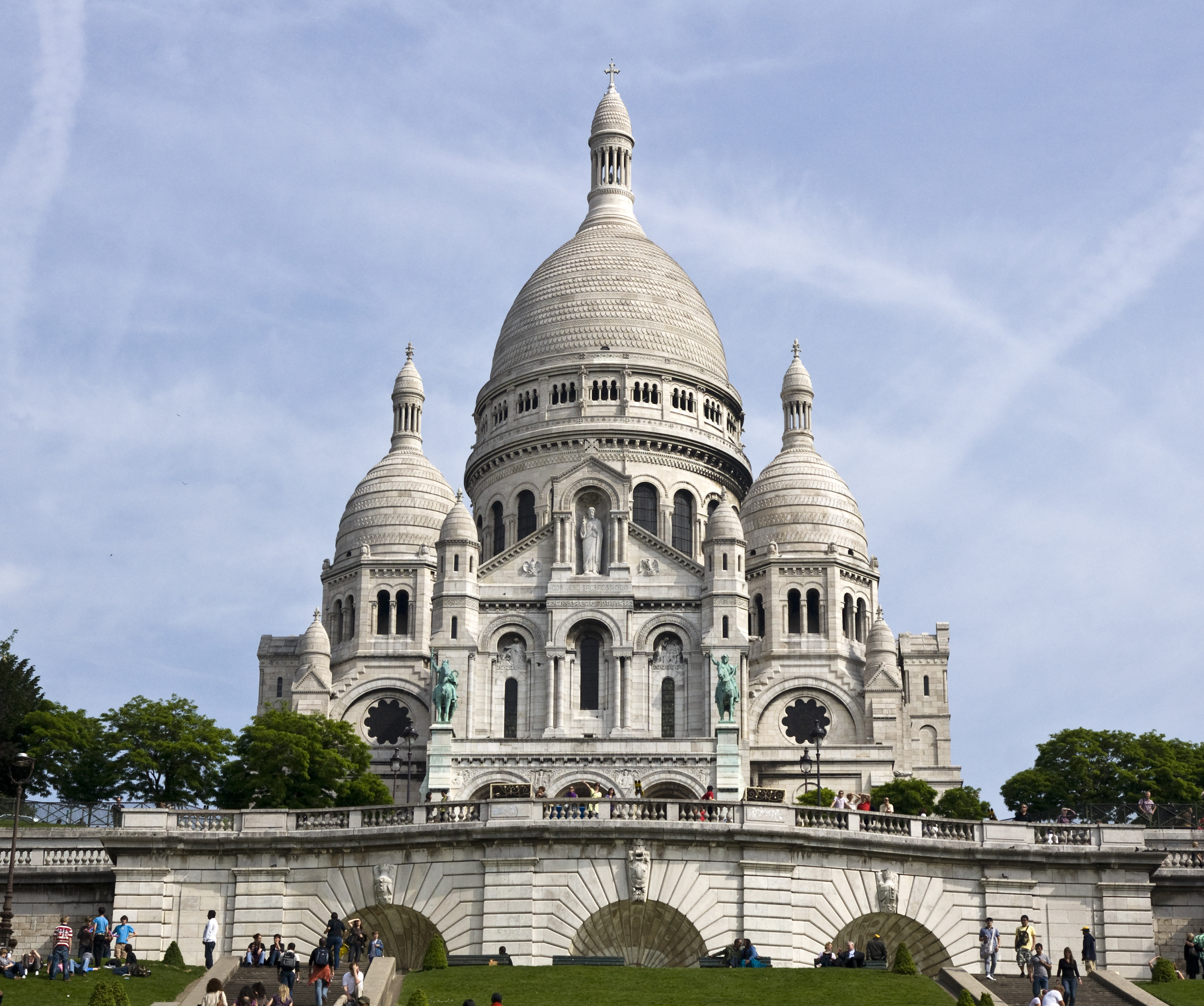 Paris - Basilique du Sacré Coeur de Montmartre